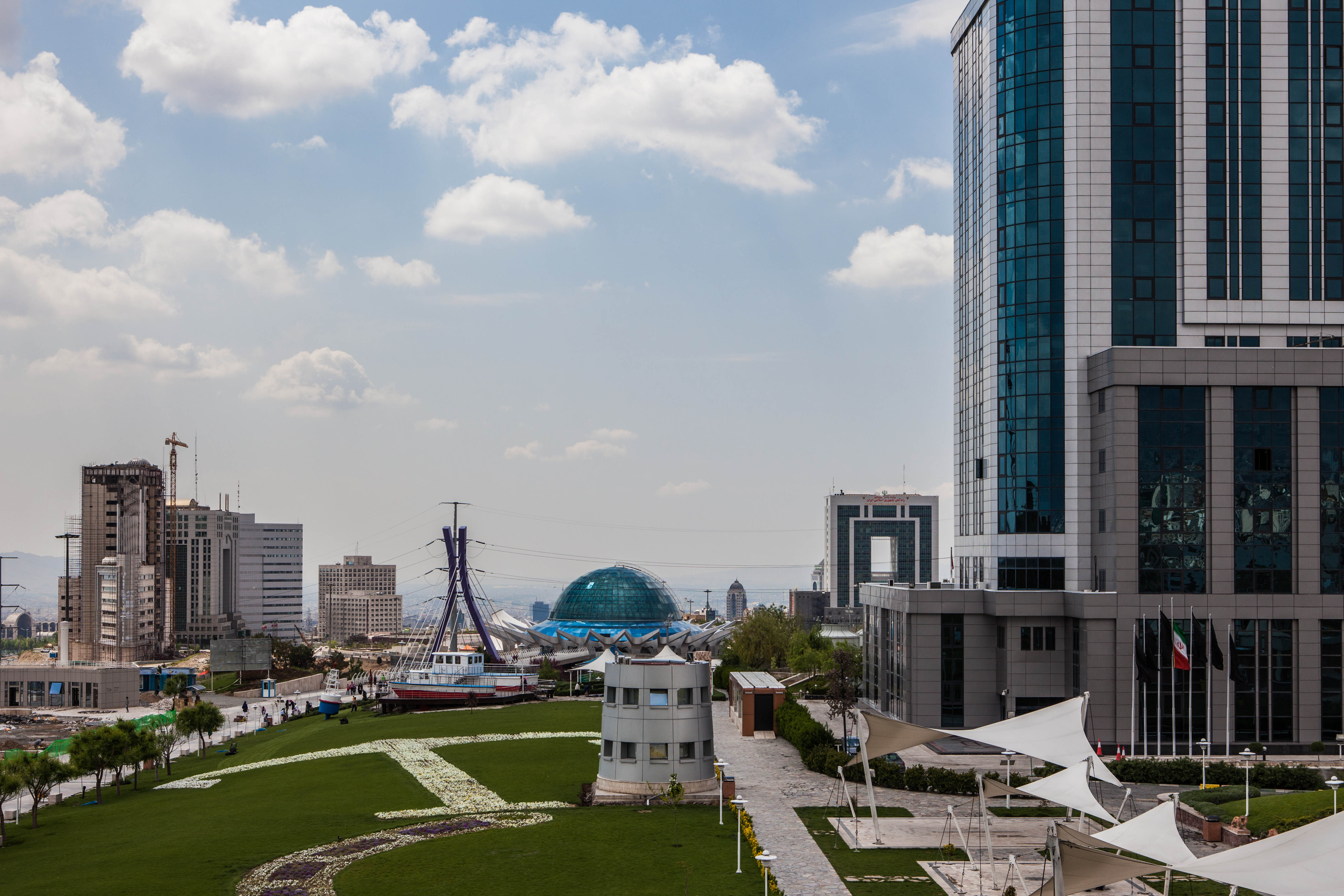 Ports parks (Boustan banader), Tehran, Iran